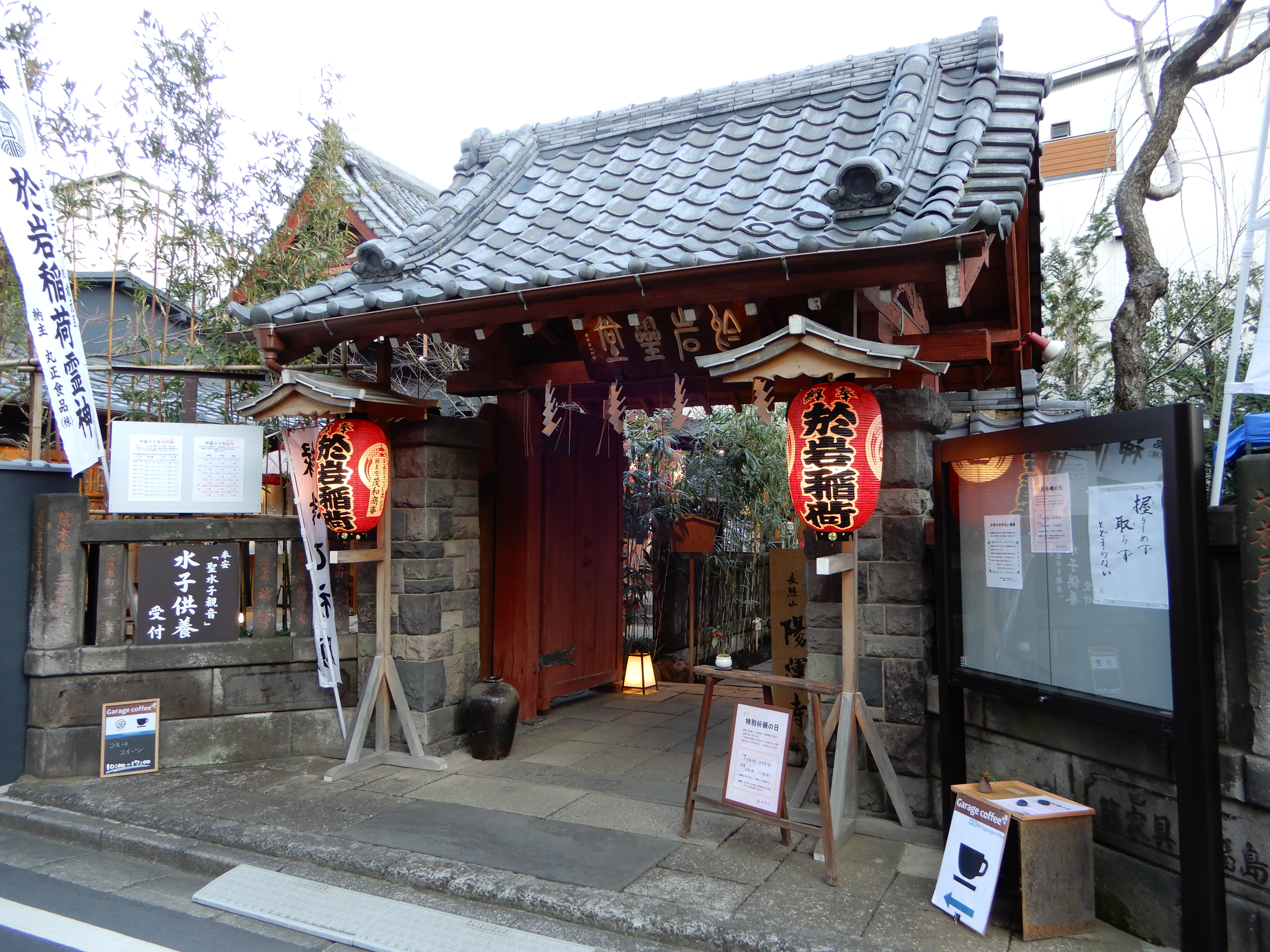 長照山 陽運寺 (お岩稲荷お岩稲荷陽運寺) 〒160-0017 東京都新宿区左門町18番地 四谷怪談ゆかりの寺院